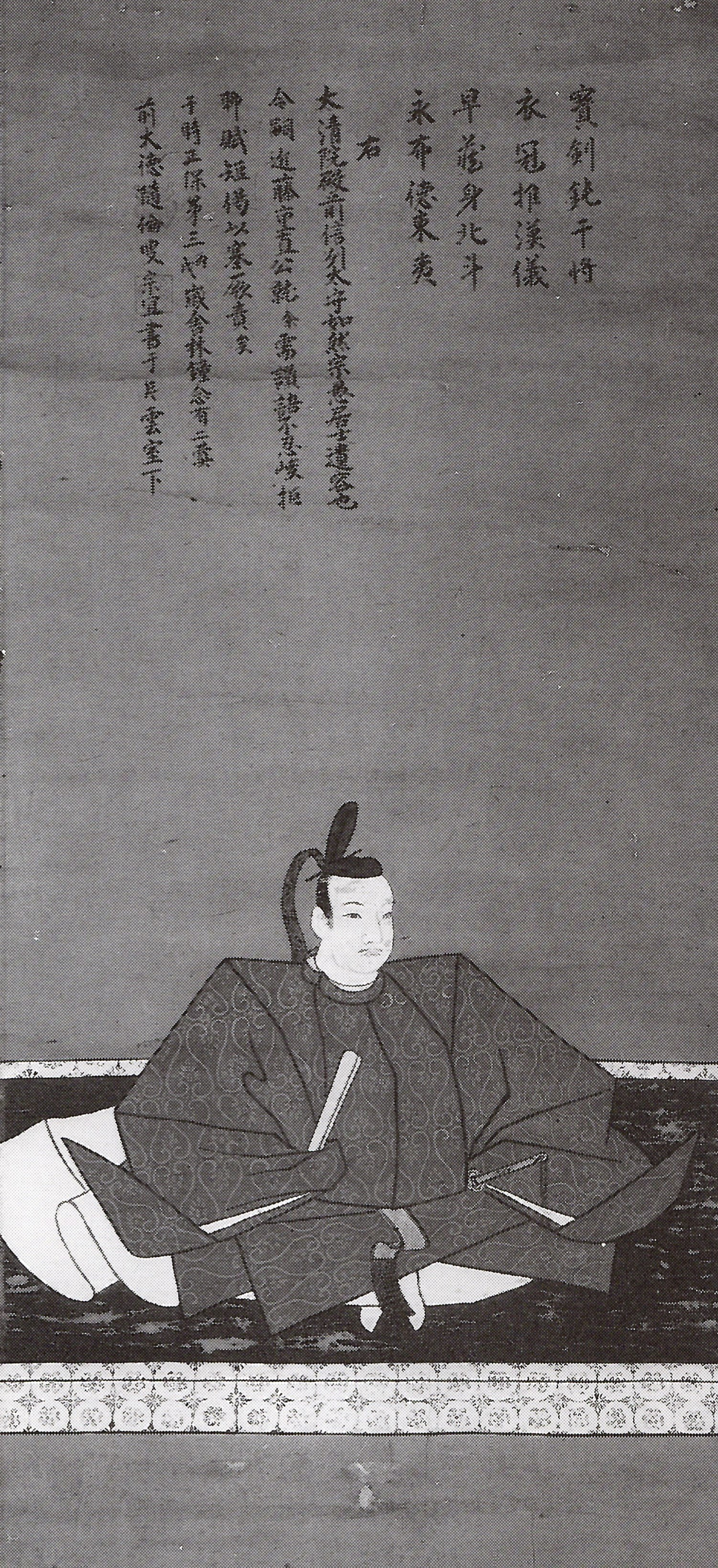 近藤政成の肖像。